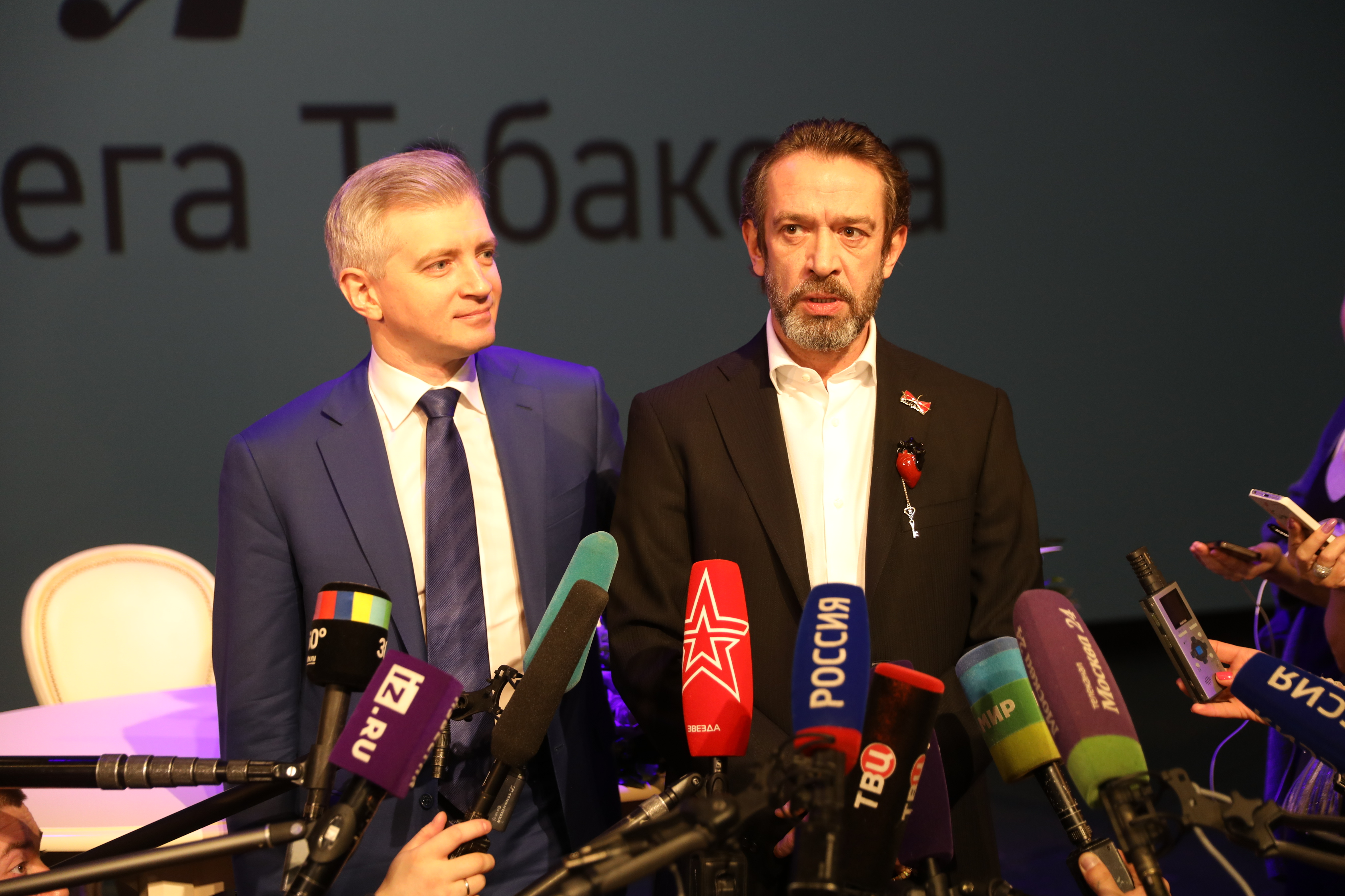 Представление труппе Московского театра-студии «Табакерка» нового художественного руководителя – народного артиста России Владимира Машкова